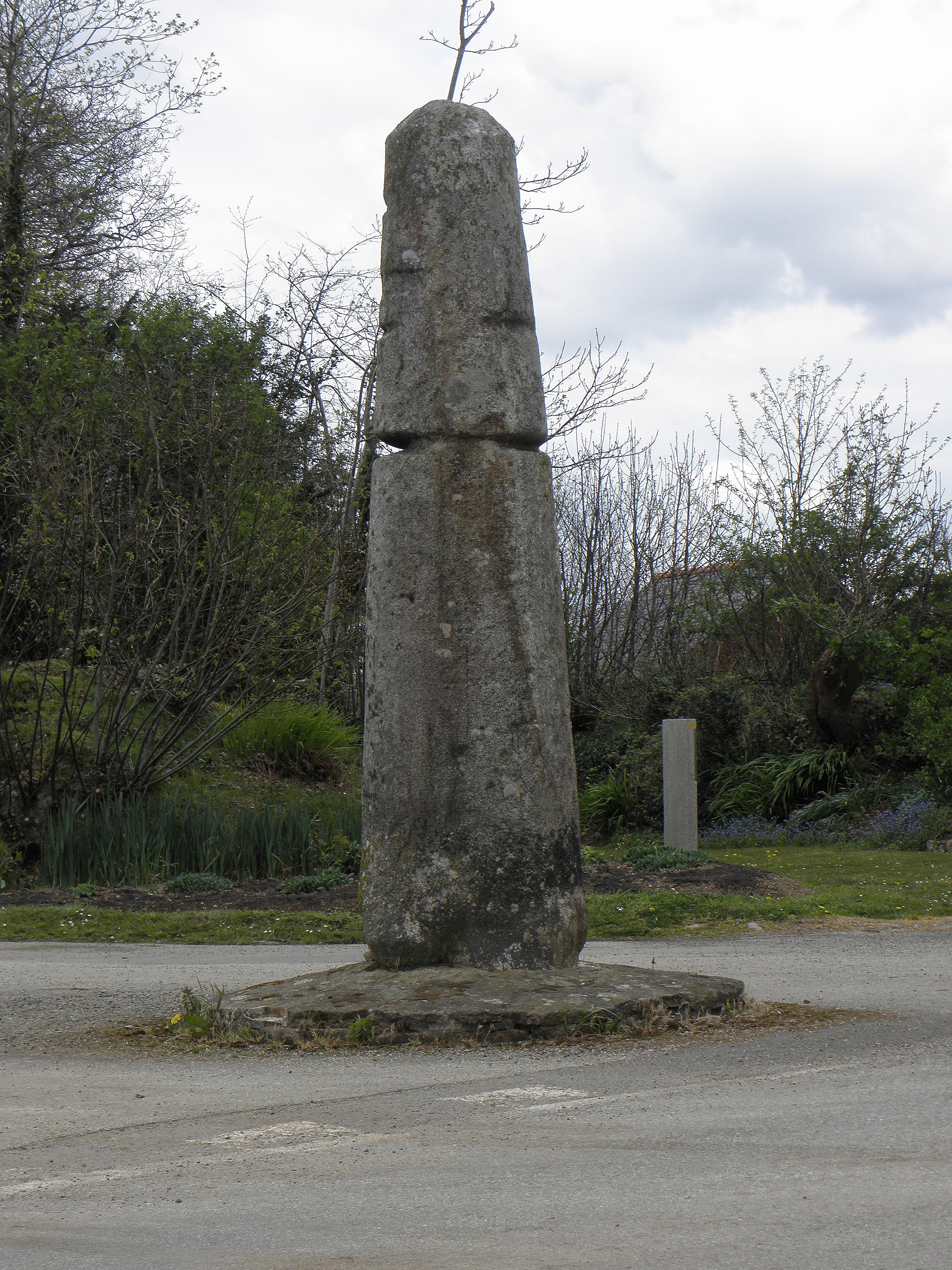 La Quenouille de Sainte-Barbe ou le Fuseau : stèle protohistorique à Ploéven (29).